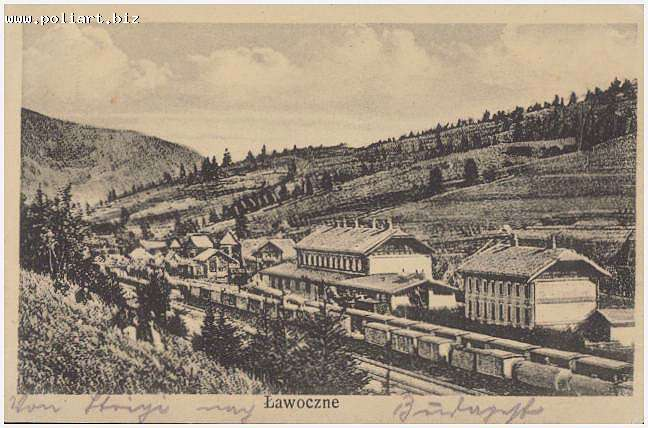 Старое фото с. Лавочное (ныне Сколевский р-н Львовской области)